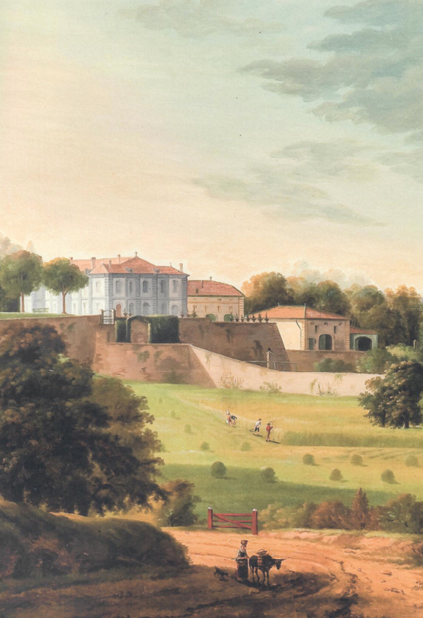 Peinture du château du Reposoir en 1791.